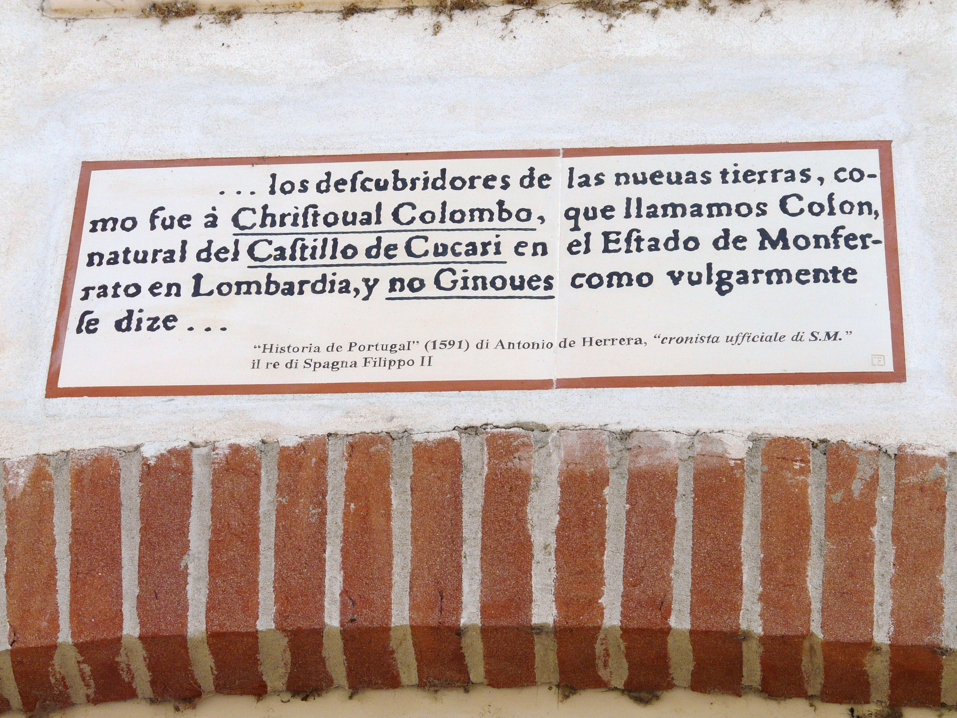 Targa-lapide di Cuccaro Monferrato, Piemonte, Italia